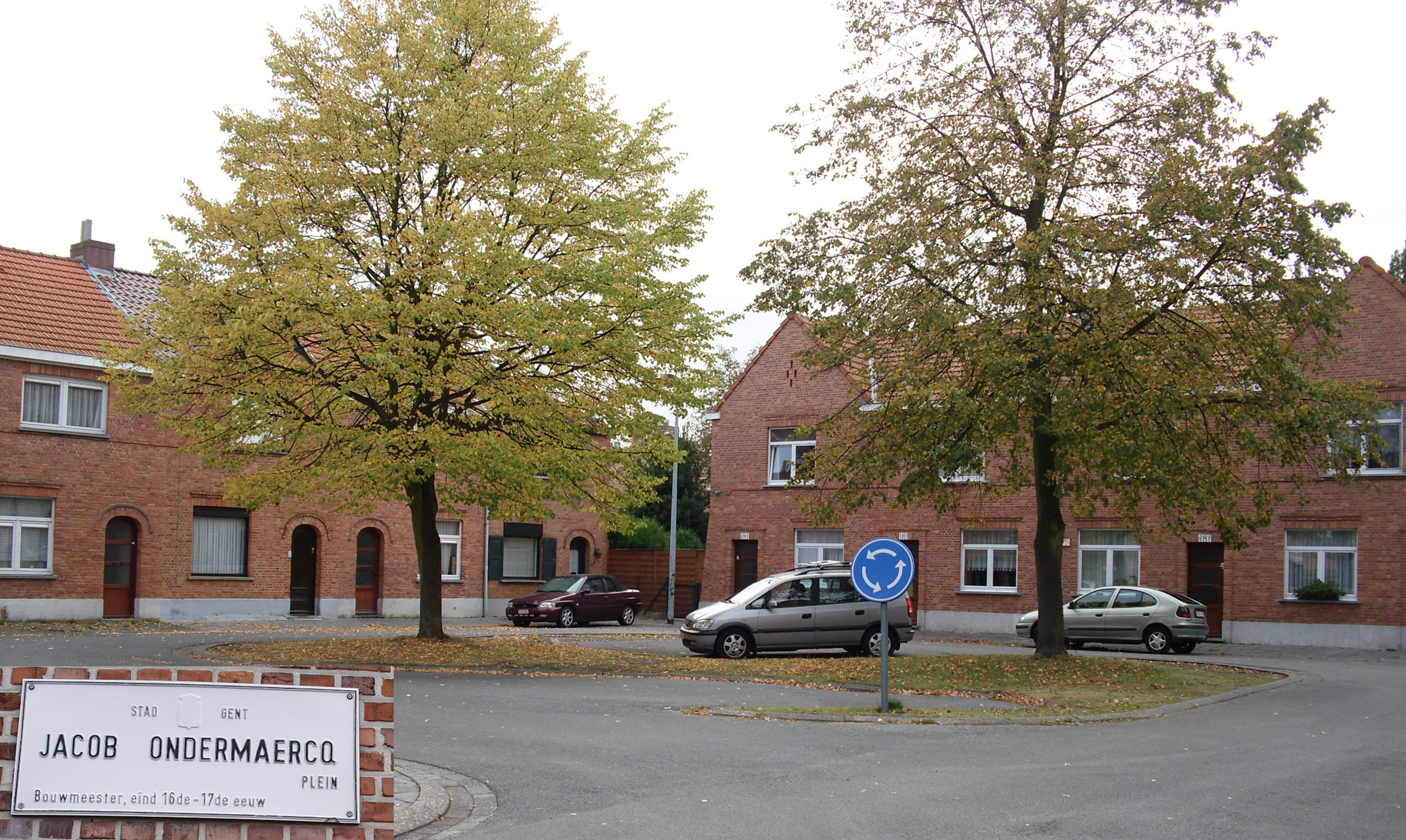 Jacob Ondermaercqplein - Nieuw Gent - Gent - Oost-Vlaanderen - Vlaanderen - België